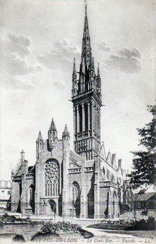 Saint-Pol-de-Léon, chapelle N-D du Kreisker : façade ouest vue depuis le lycée en 1900